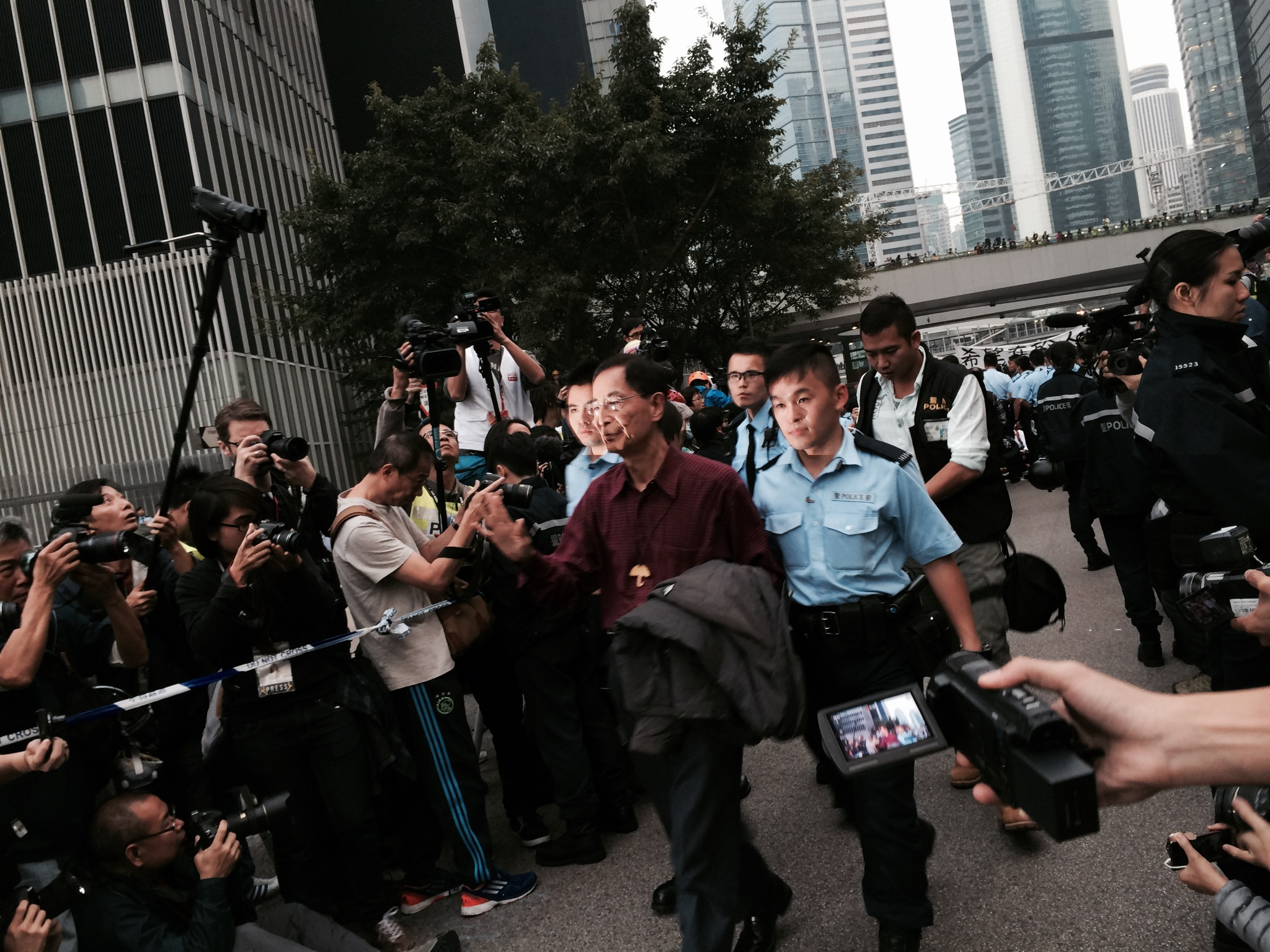 香港民主黨創黨主席李柱銘自願被警察拘捕，表示承擔責任，完成公民抗命